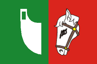 Prapor obce Jarcová